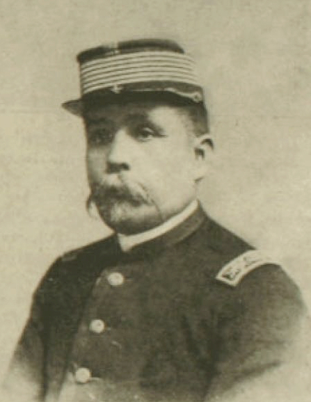 Estanislao del Canto Arteaga ( * Quillota, Chile, 23 de noviembre de 1840 - † Santiago, Chile, 23 de junio de 1923) fue un militar chileno. Participó en la Guerra del Pacífico y en la Guerra Civil de 1891.